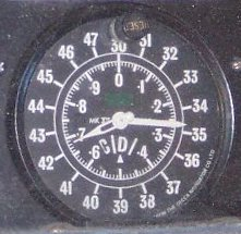 Deccometer am Decca Navigator Mk 12